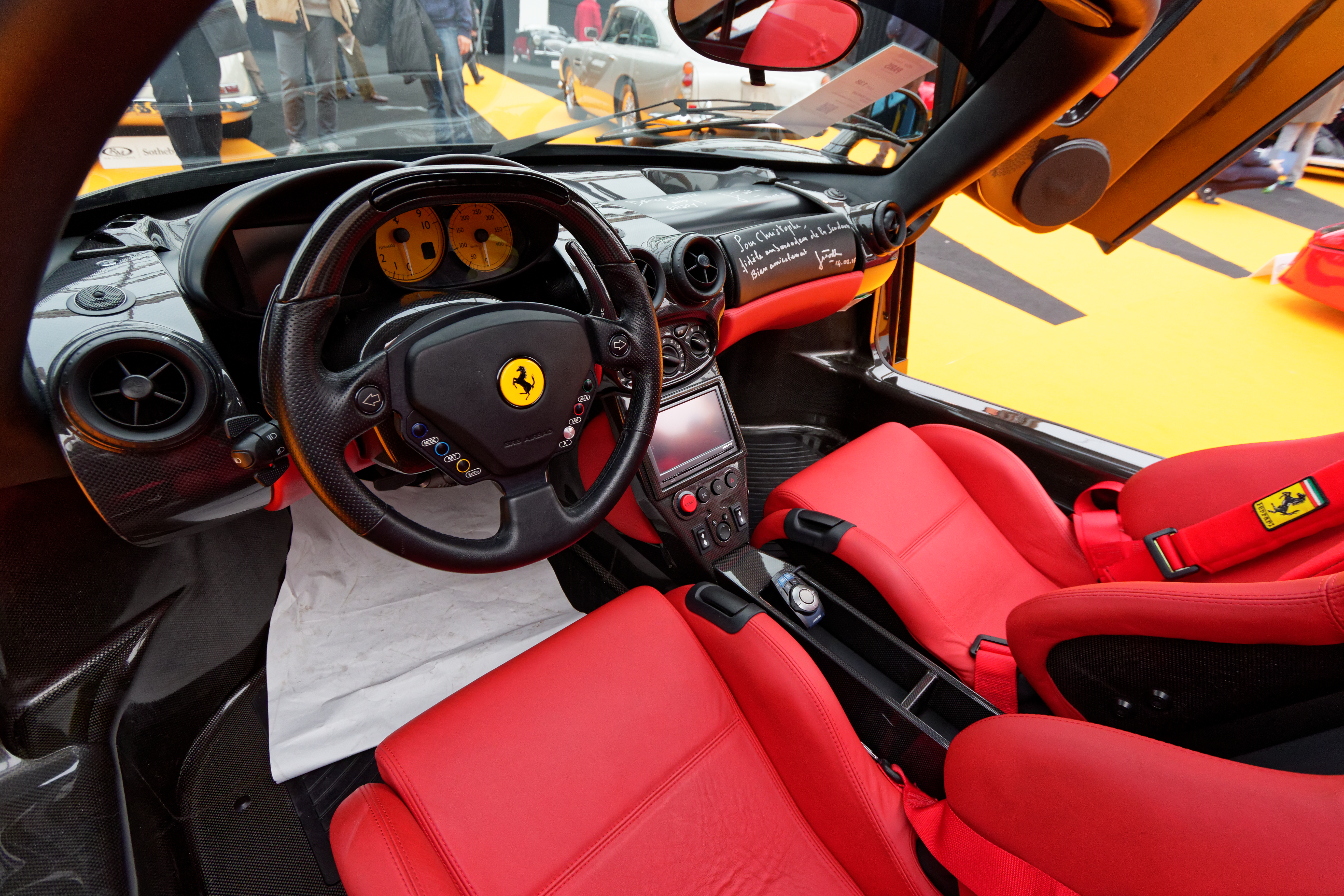 Une Ferrari Enzo de 2004 exposée lors de la vente RM Sotheby’s 2016 aux Invalides à Paris.